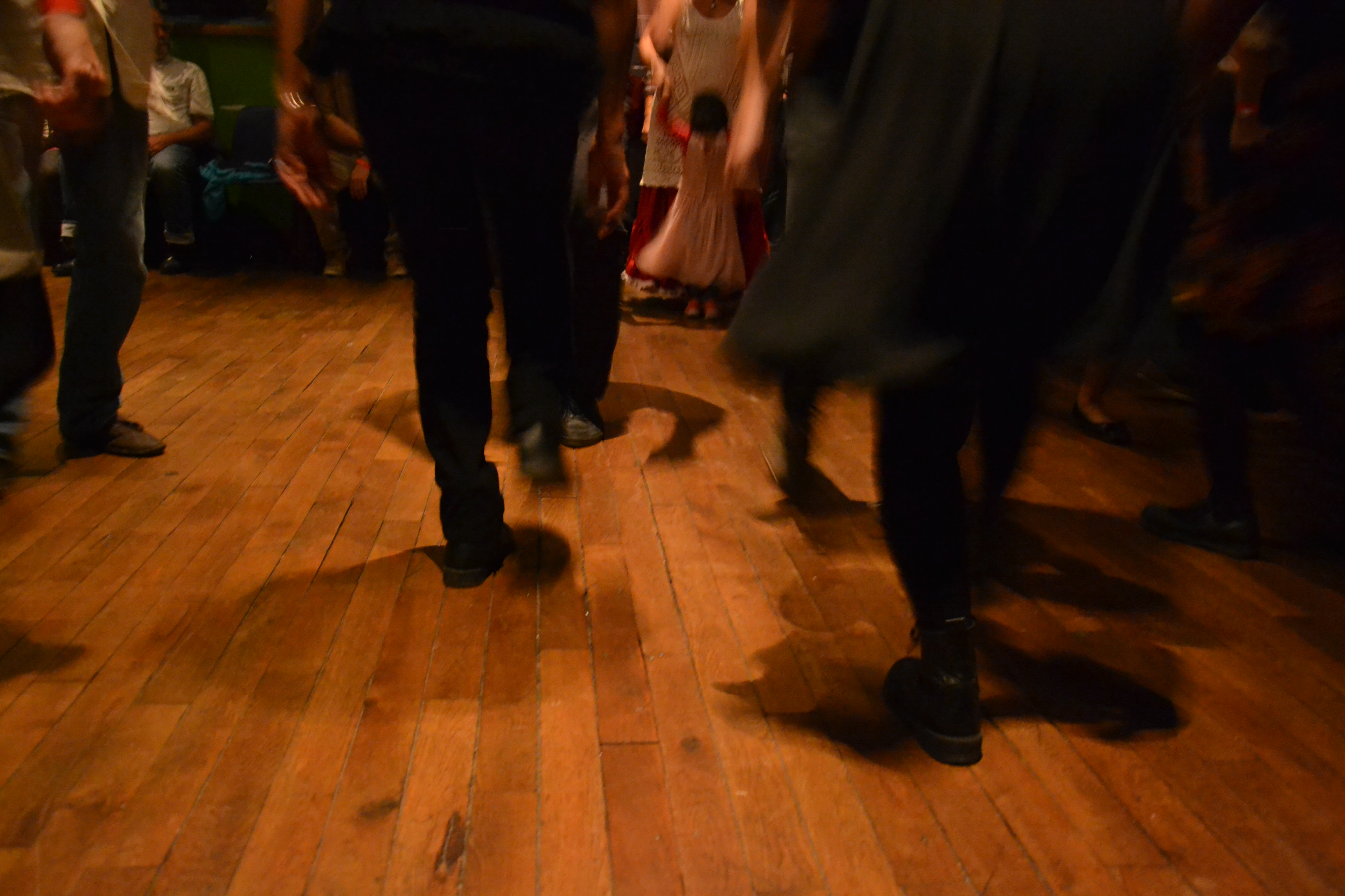 Danseurs de sautière, bal à Faux-la-Montagne (Creuse, France) lors des Rencontres musicales de Nedde 2017.